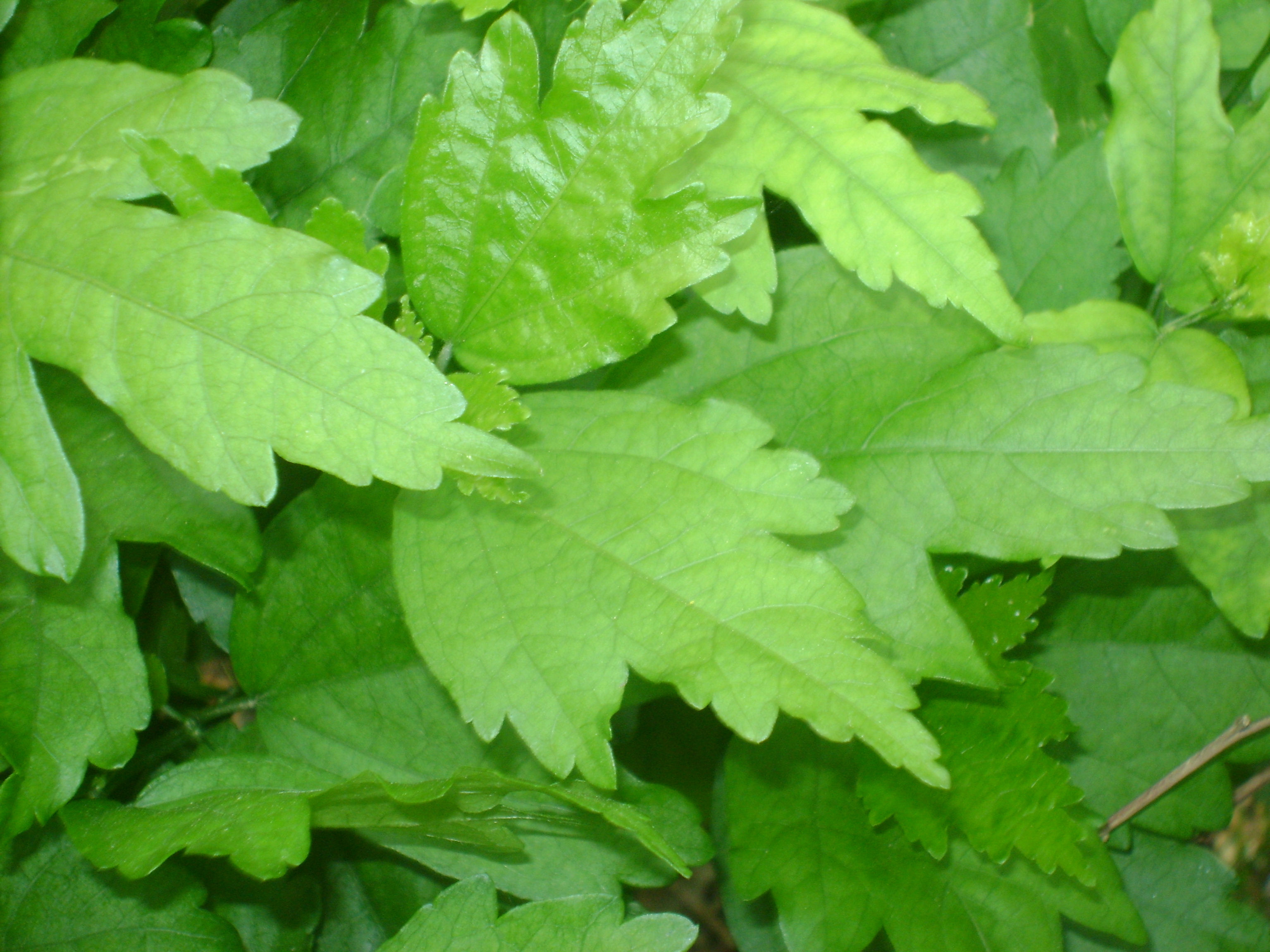 Feuille de Hibiscus syriacus